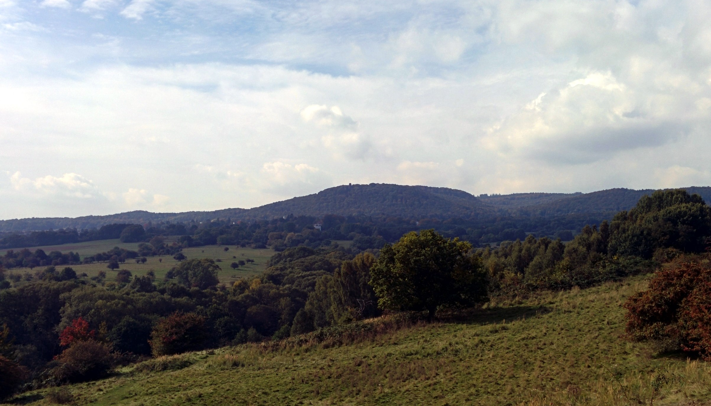 Der Brasselsberg von der Dönche aus gesehen